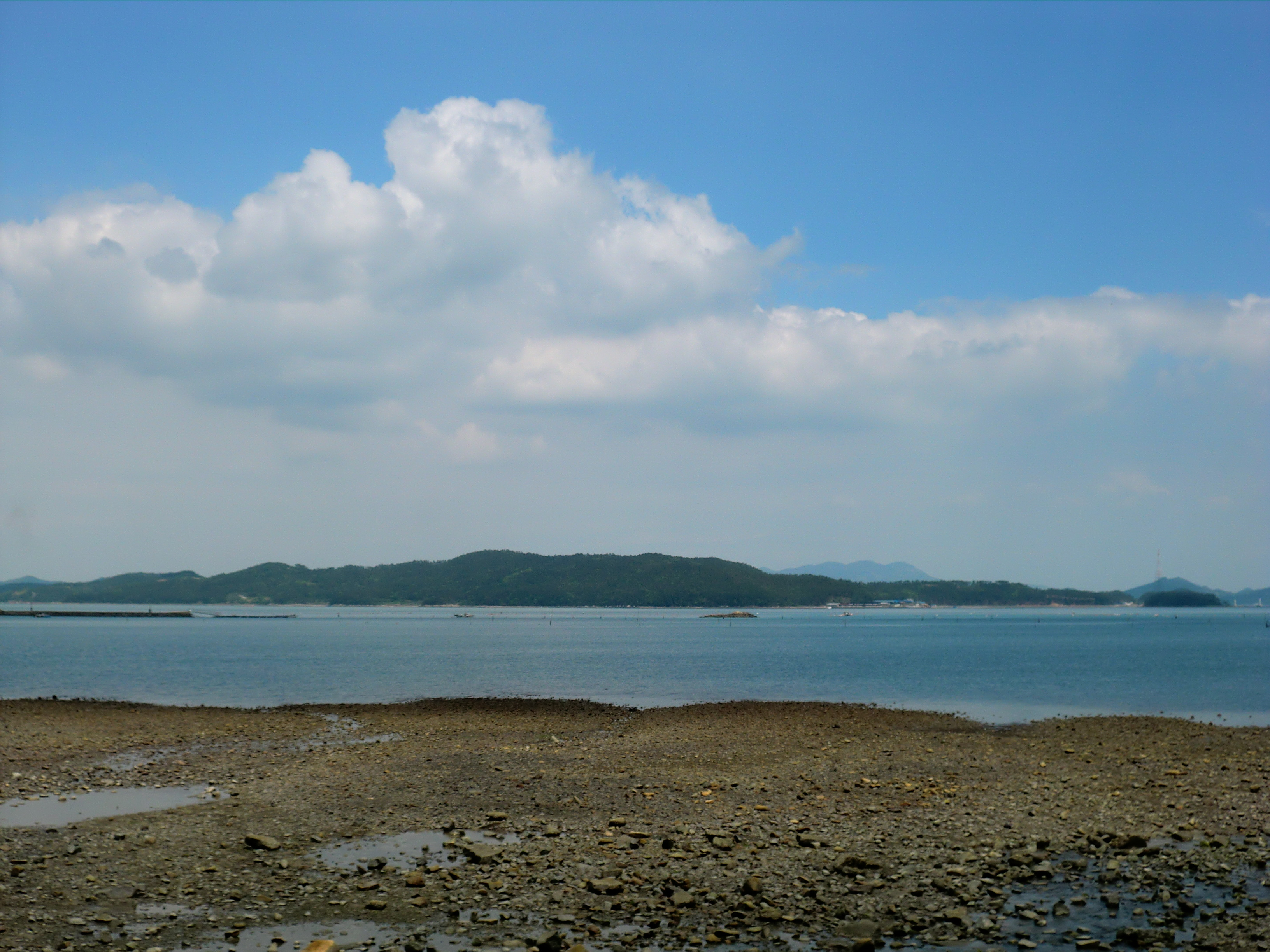 장보고 기념관에서 본 고금도